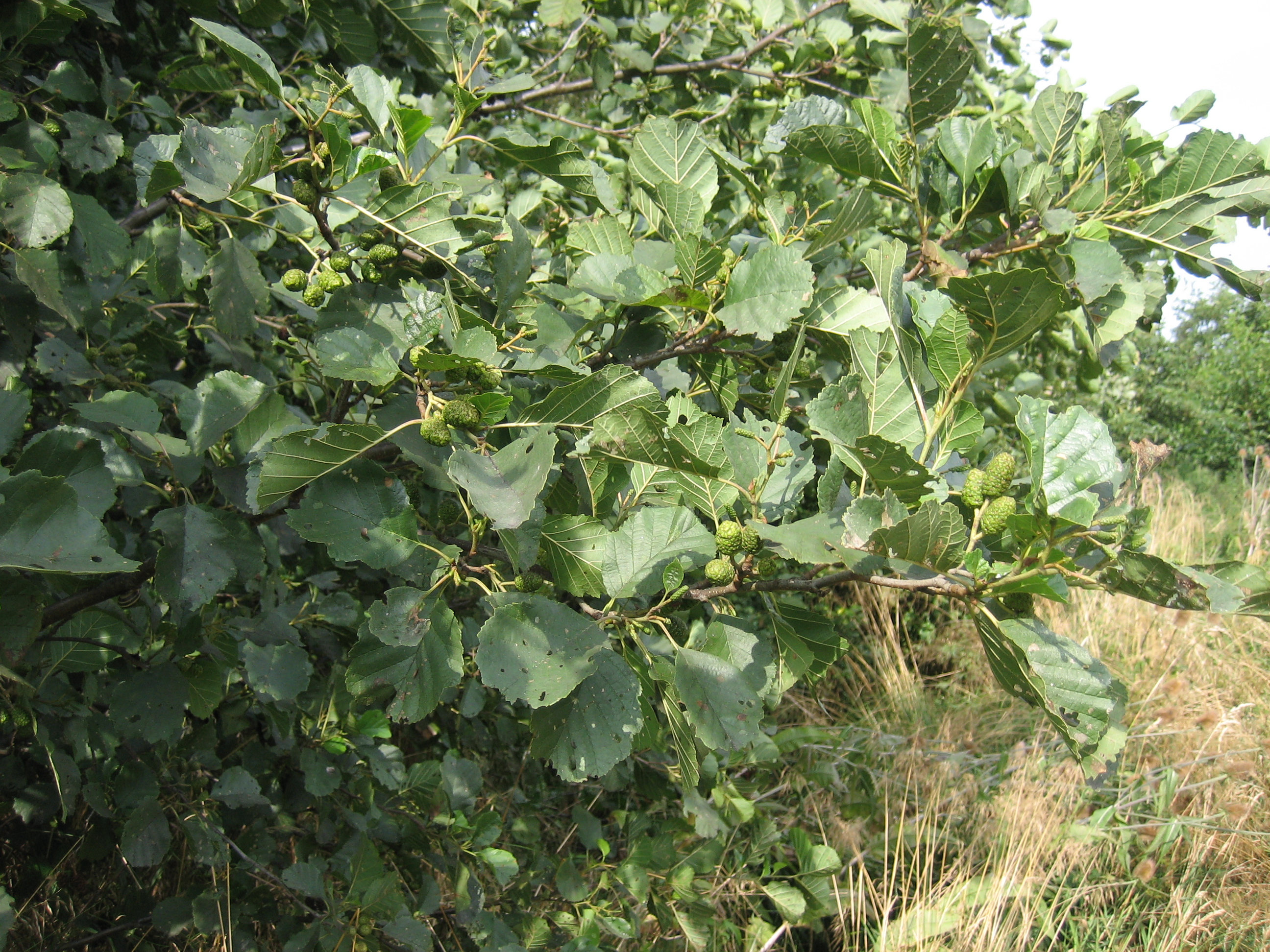 Alnus glutinosa foliage and fruit